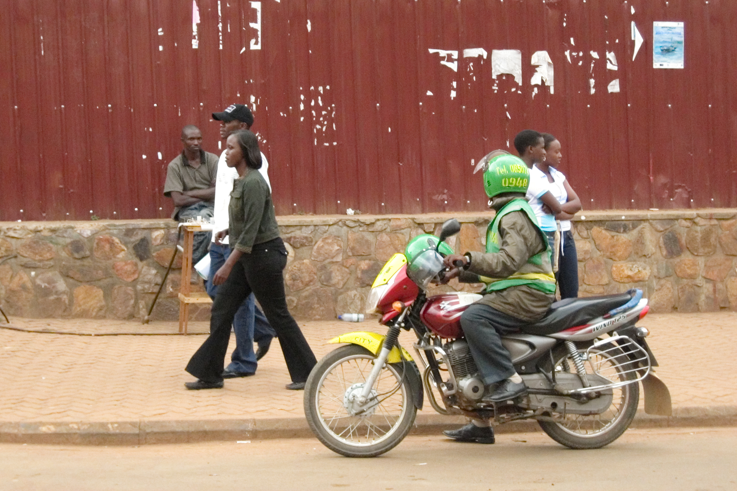 Taxi moto in Kigali, Rwanda